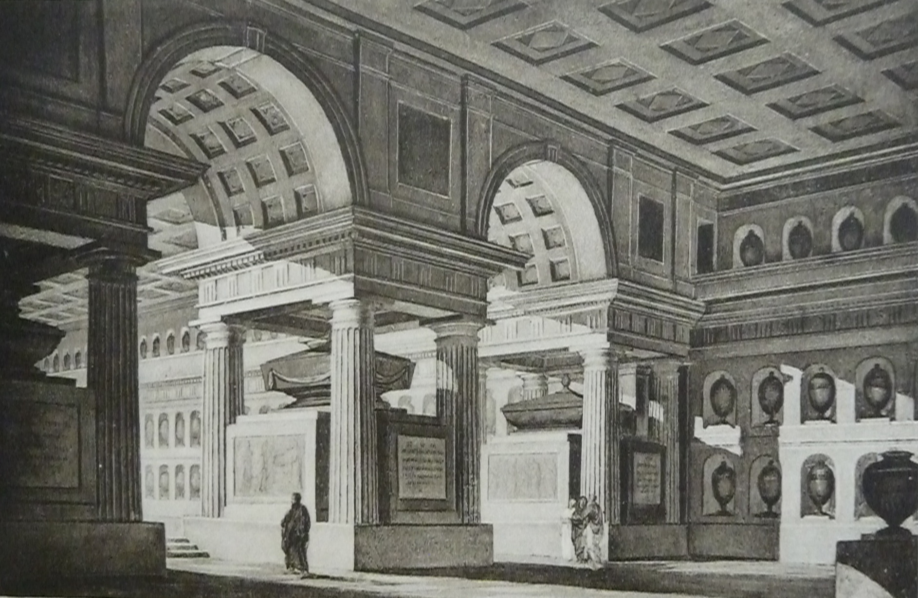 Originalzeichnung von Hermann Mitterer